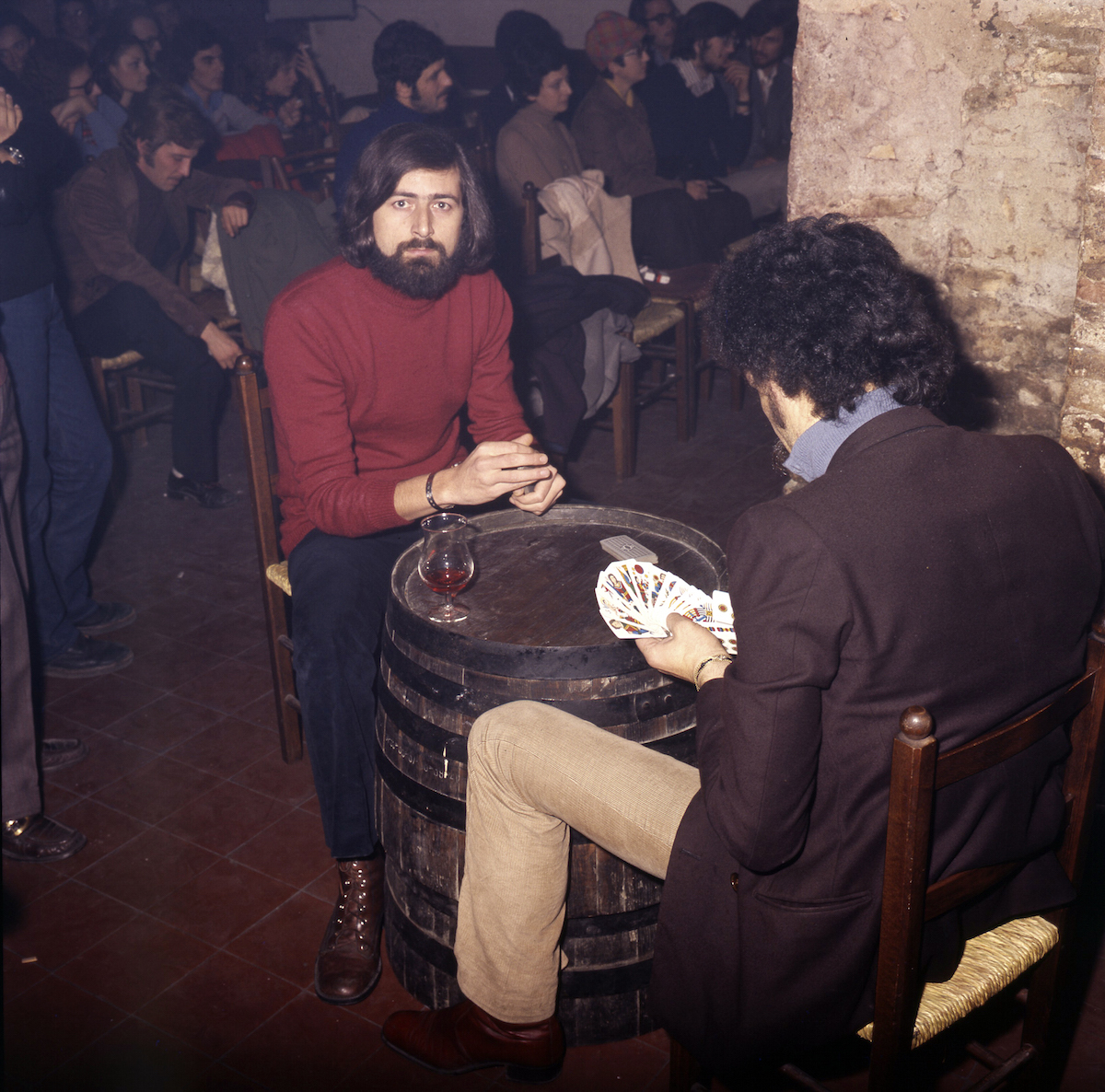 Francesco Guccini durante una partita a carte all’Osteria delle Dame di Bologna